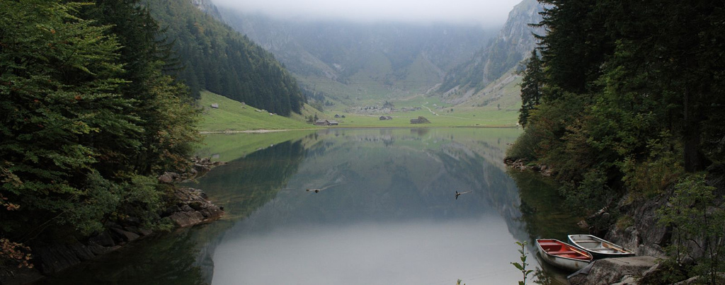 Seealpsee